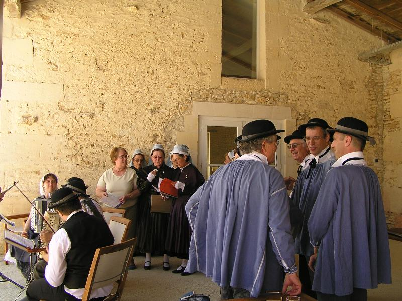 les gars d'o pays-bas